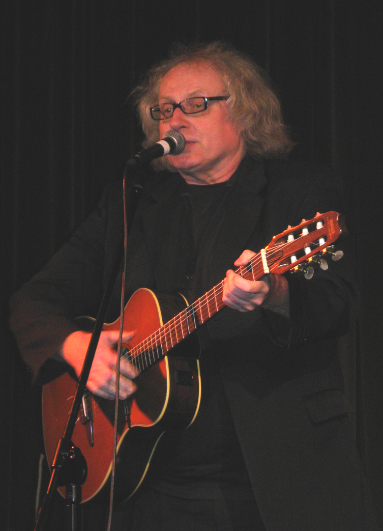 Ryszard Makowski - juror Warszawskiej Palmy 2008